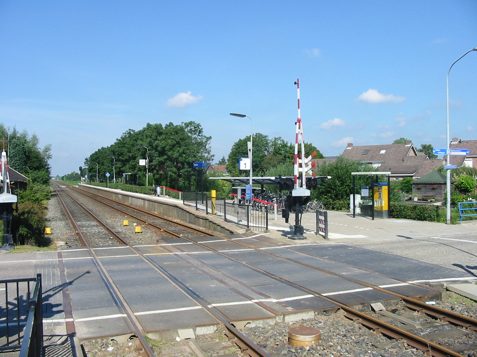 Station Opheusden Opheusden